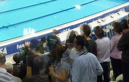 Subject movement in a photo stitching of London Aquatics Centre interior